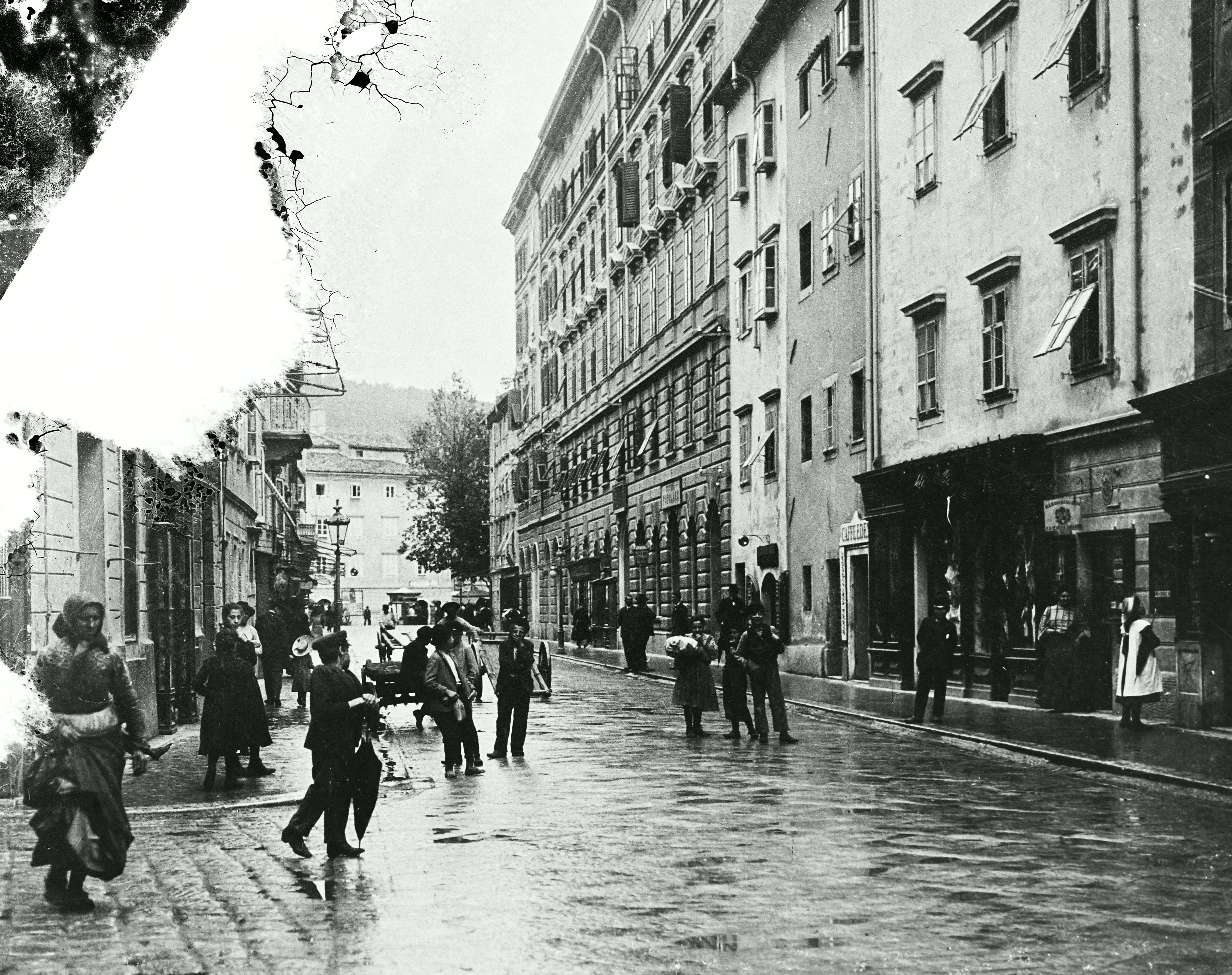 Ulica Ante Starčevića. Location: Croatia, Rijeka Tags: street view Title: Ulica Ante Starčevića.